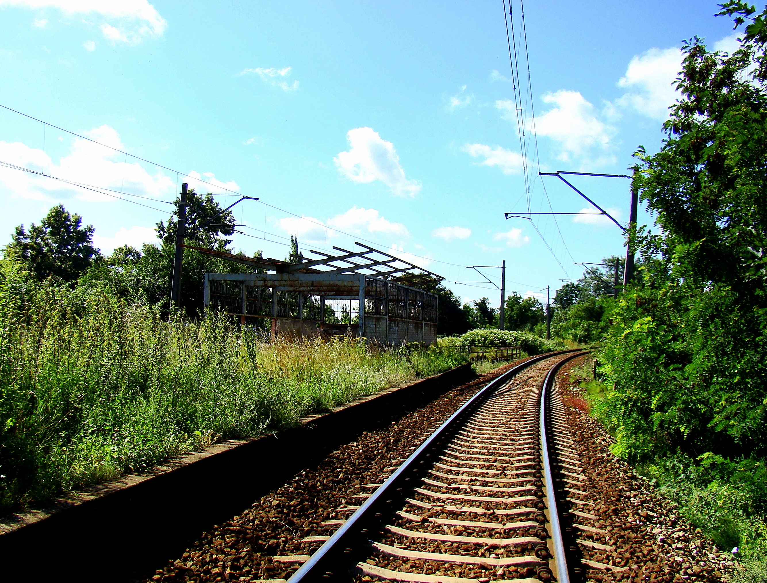 Szczecin Gocław, przystanek kolejowy (nieczynny), (Szczecin, Województwo zachodniopomorskie), Polska